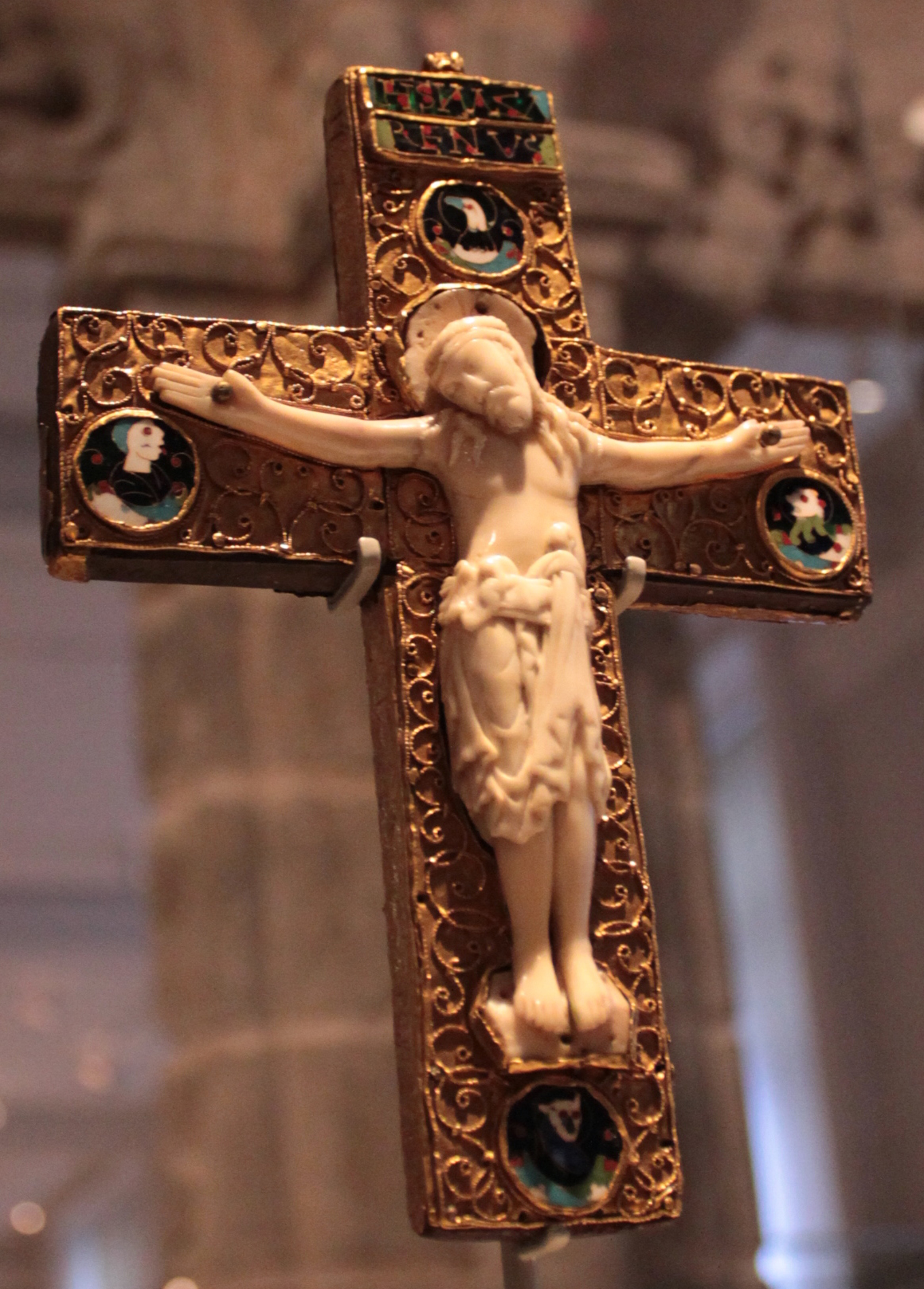 BLW reliquary cross